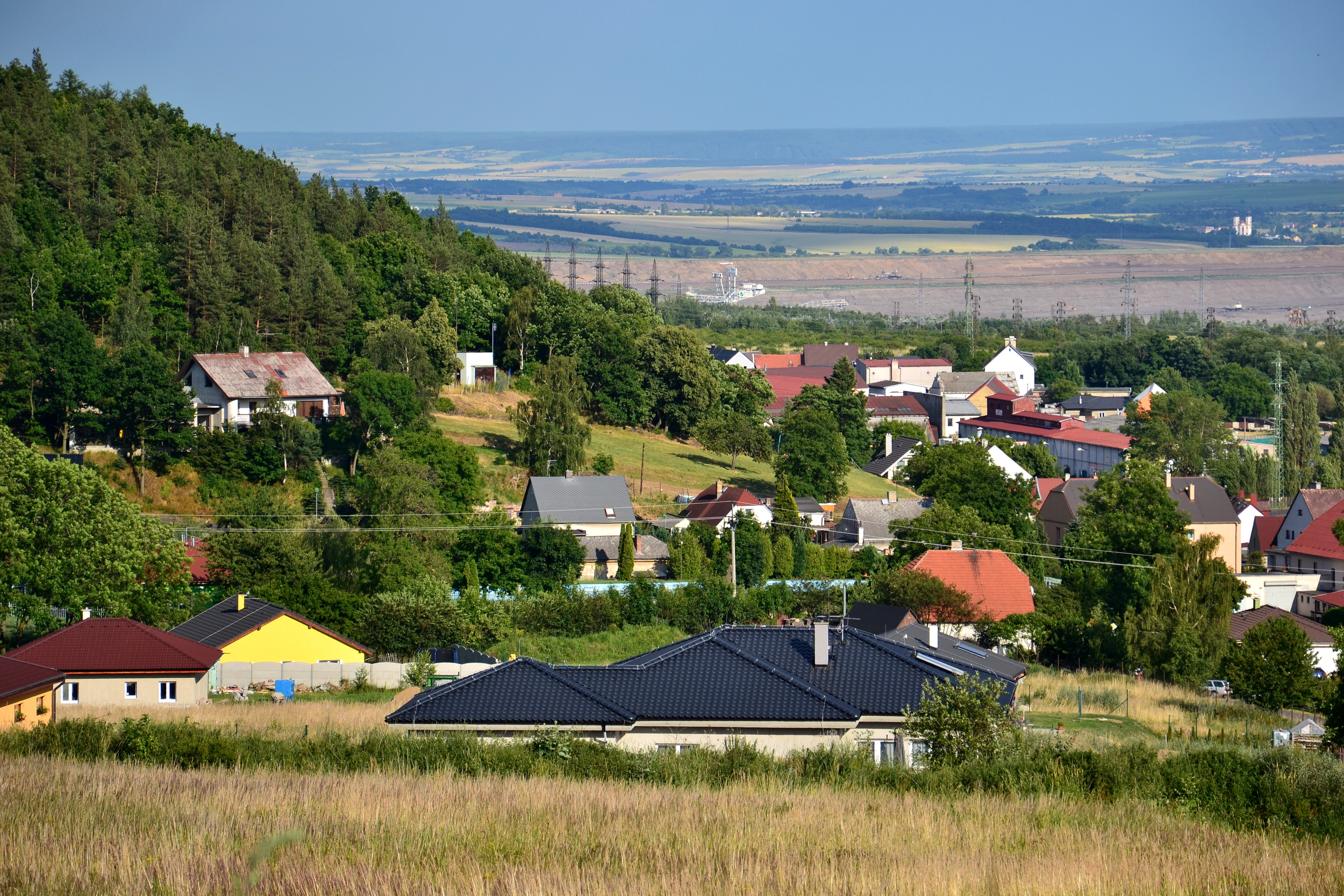 Pohled od severozápadu